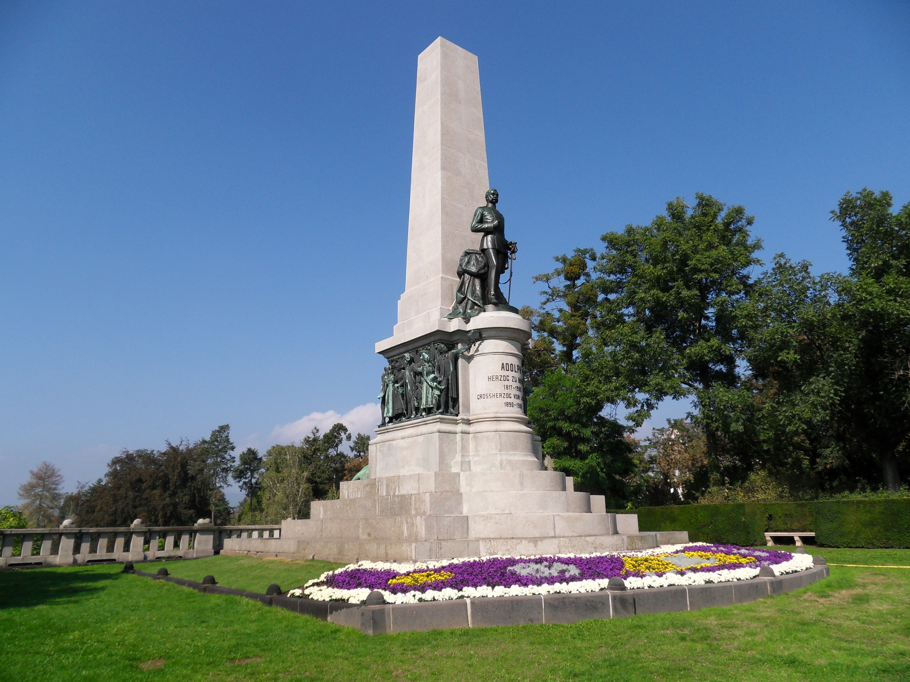 Landesdenkmal in Wiesbaden-Biebrich für Adolph, Herzog zu Nassau und später Großherzog von Luxemburg. Blick von Südosten. Das Denkmal wurde nach einer Restaurierung wenige Tage zuvor neu enthüllt.